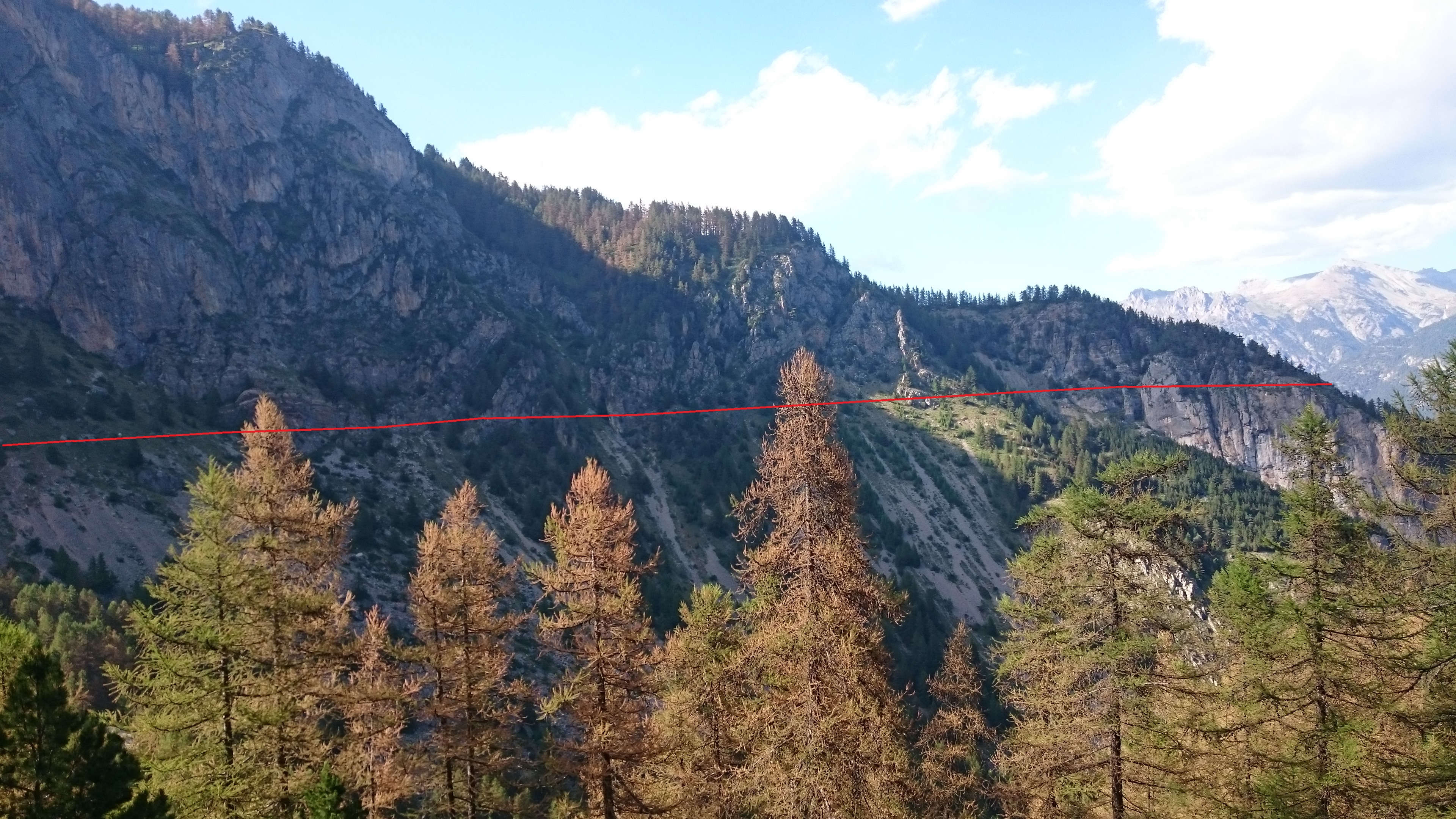 Trace canal Pierrefeu